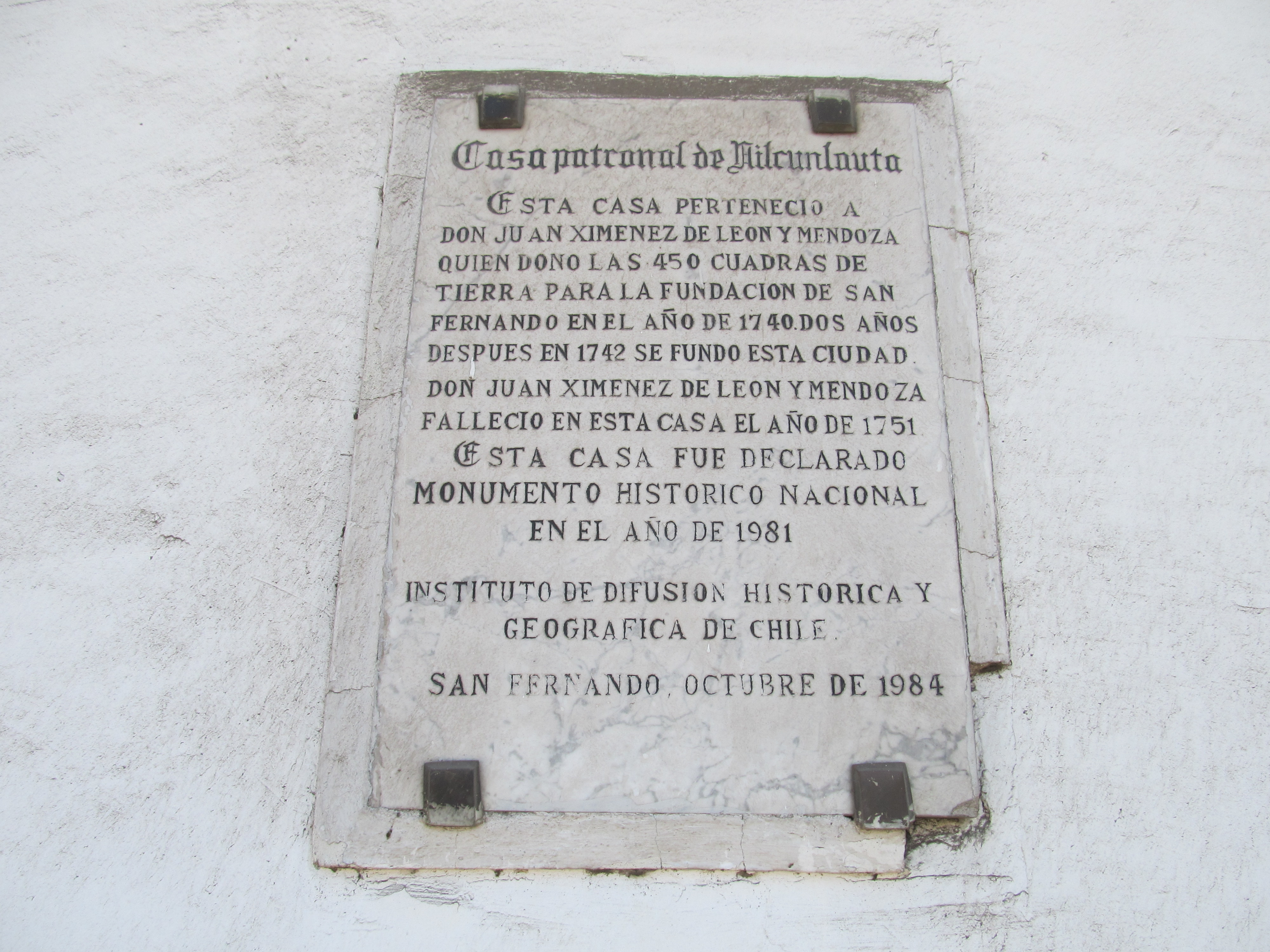 Casa patronal del fundo de Lircunlauta This is a photo of a national monument in Chile: 365